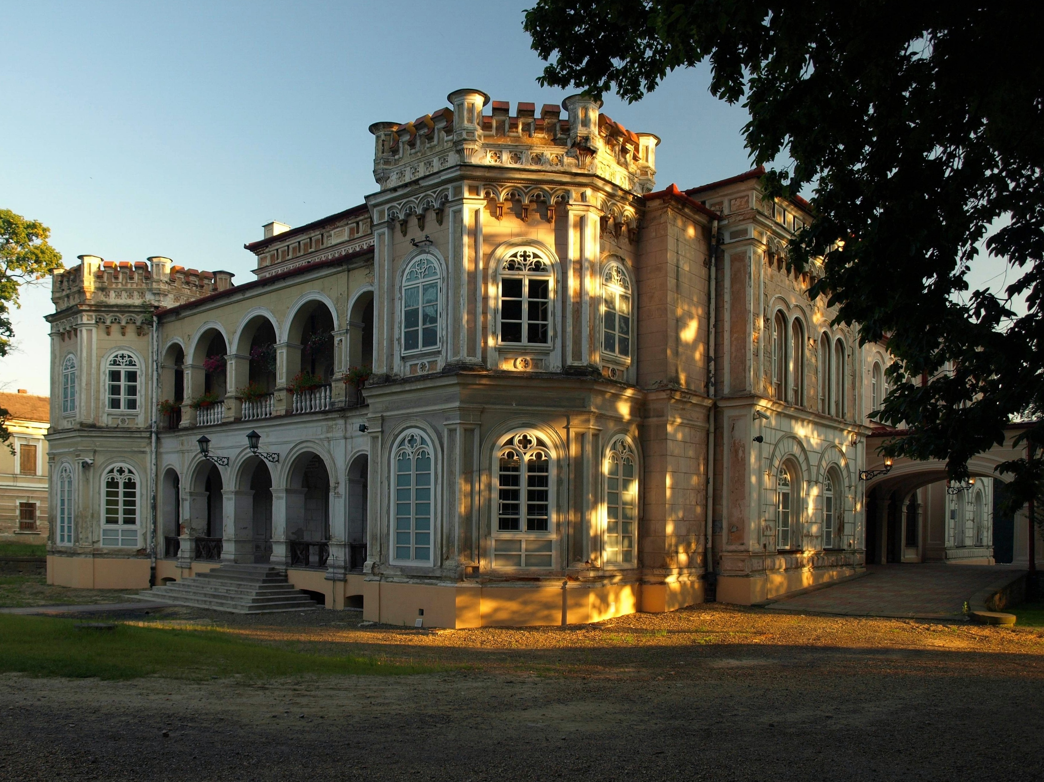 Pałac Wodzickich w Tyczynie